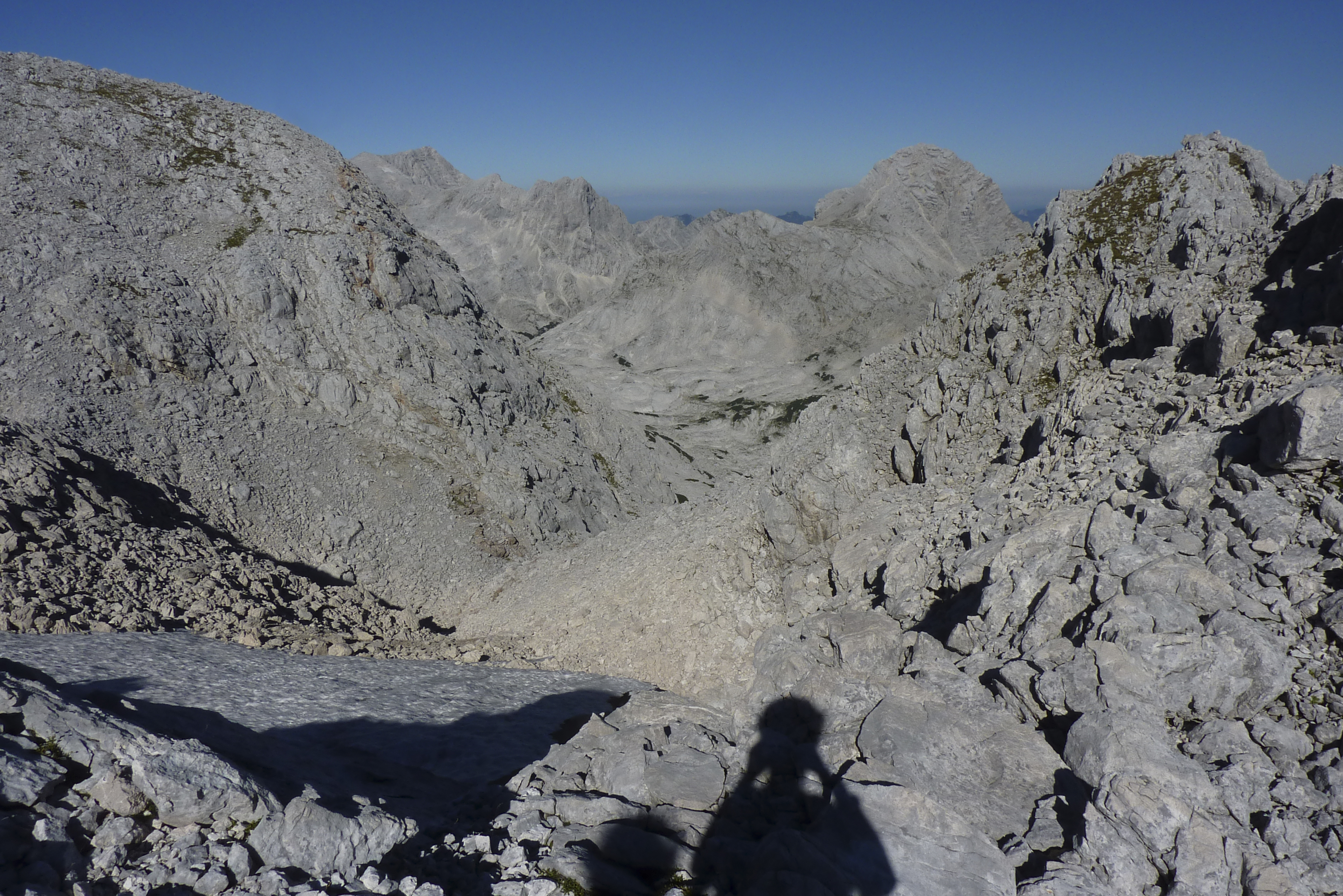 Totes Gebirge West This media shows the nature reserve in Styria with the ID NSG 16 a.